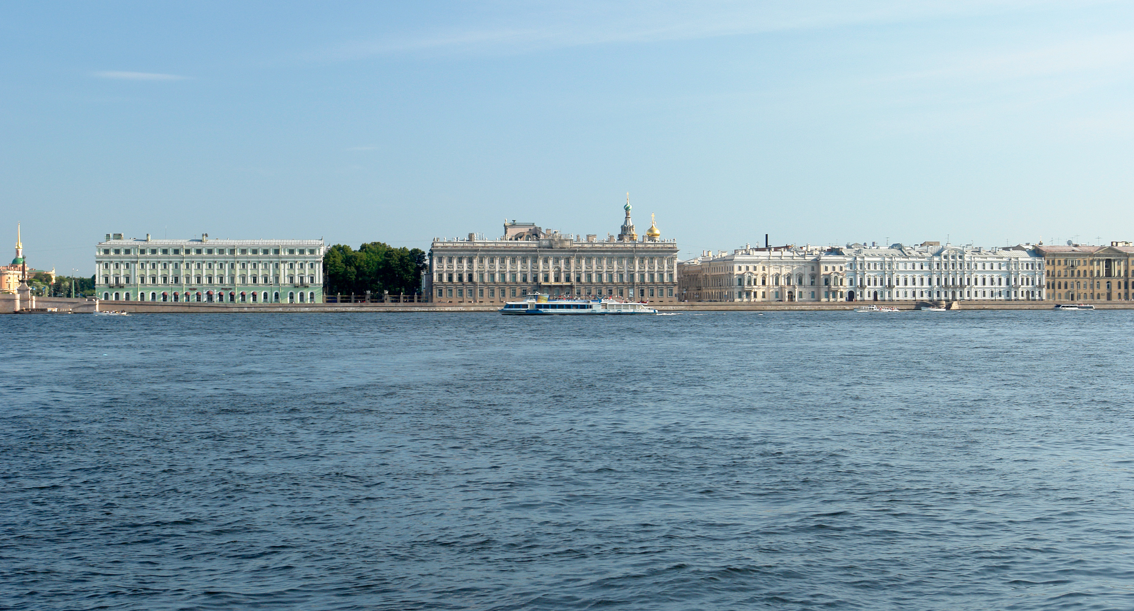 Дворцовая набережная (Вид с Петропавловской крепости).